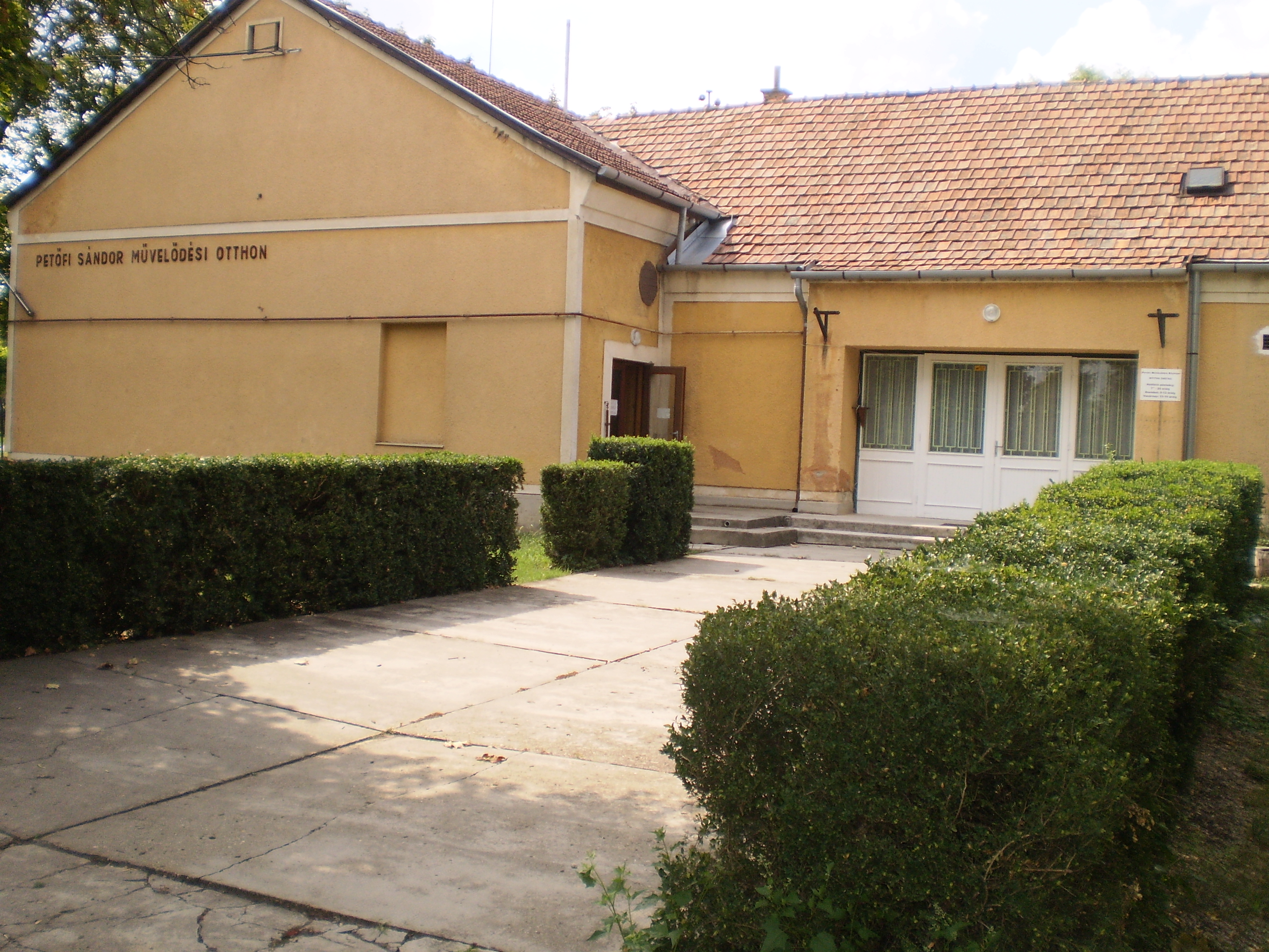 Petőfi Sándor Művelődési Otthon Nagymágocson, Magyarország